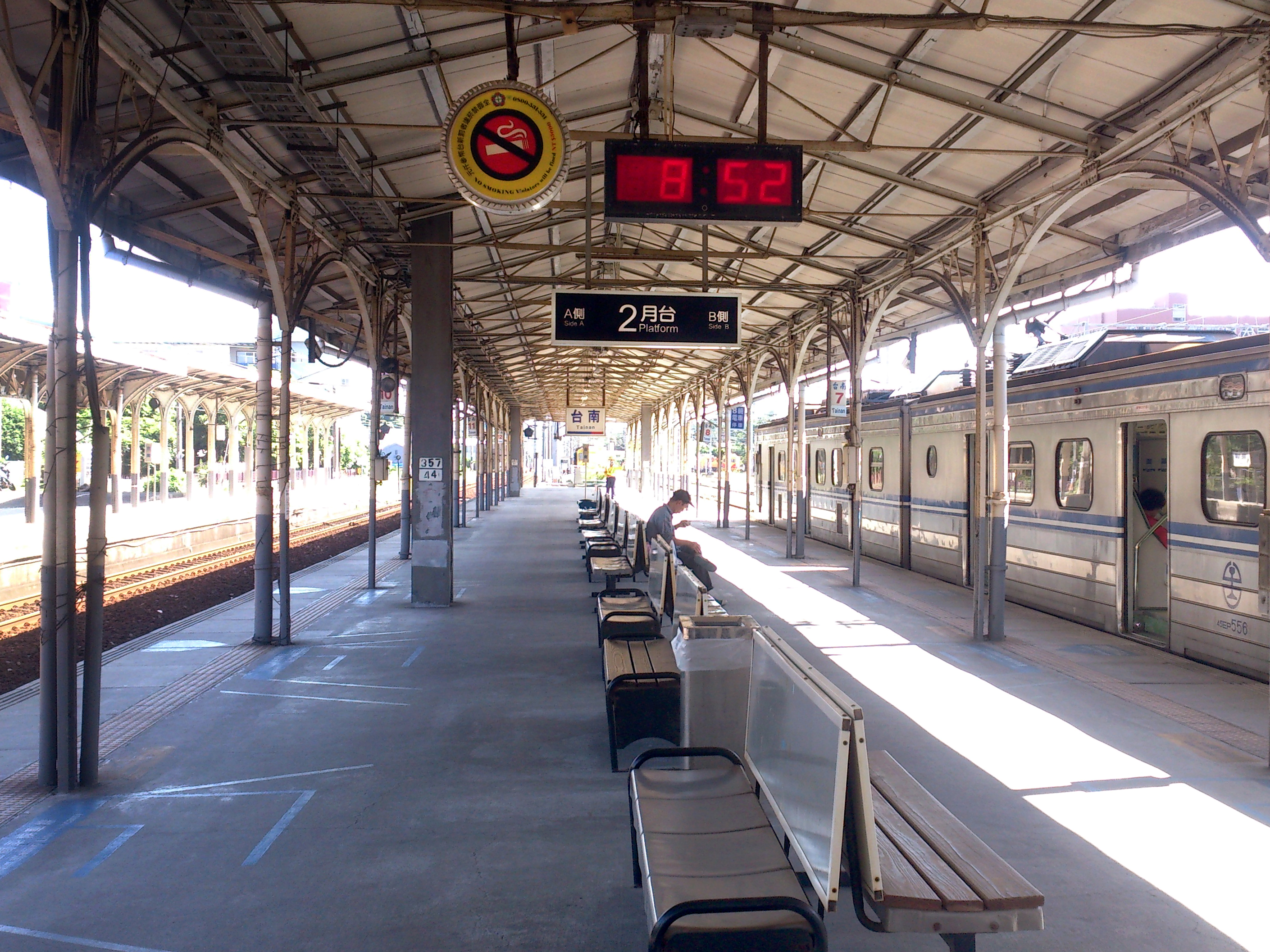 臺灣鐵路管理局電聯車EMU556停靠臺南車站第二月台。